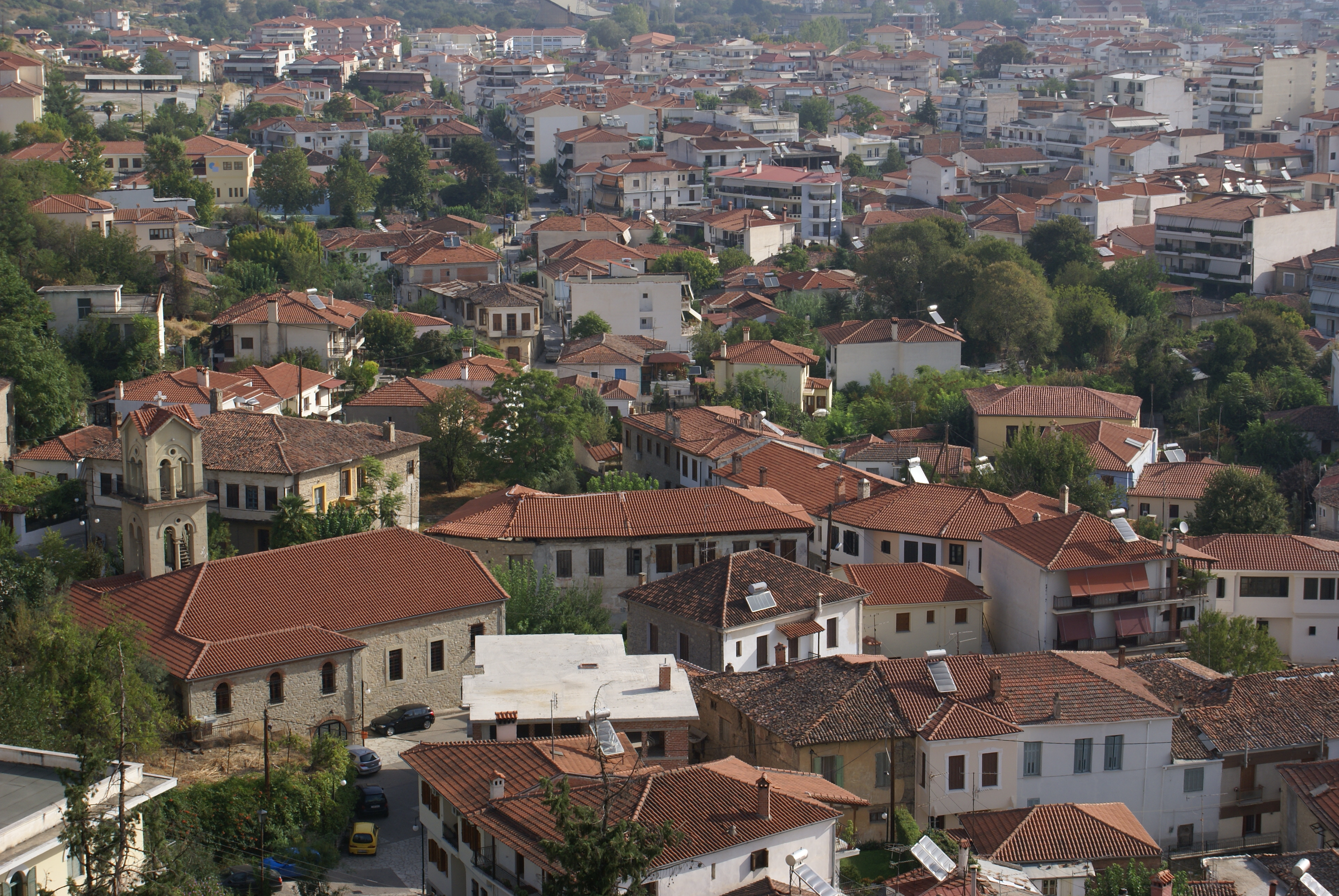 Βυζαντινό Κάστρο Τρικάλων, παλιά πόλη Βαρούσι«Βυζαντινό Κάστρο Τρικάλων, παλιά πόλη Βαρούσι»